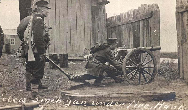 武昌起義中的起義軍炮兵。